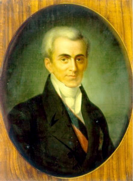 Ioannis Kapodistrias (1776-1831) par D. Tsokos. Source : wikipedia anglais Image:Ioannis Kapodistrias (1776-1831)..JPG